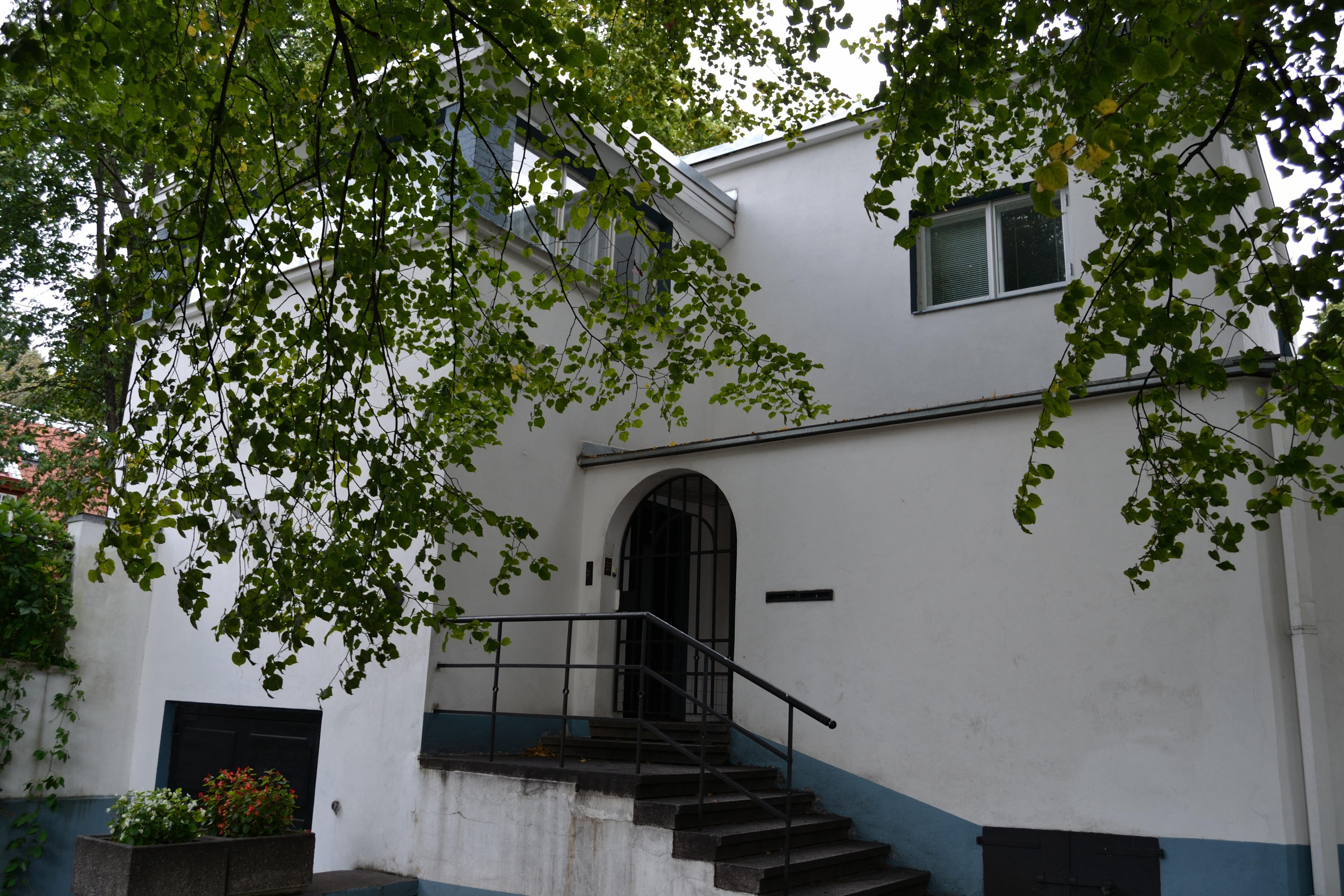 Tallinn, elamu Toompuiestee 6, 1929